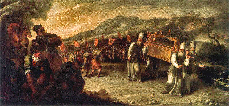 La obra representa a los israelistas portando el Arca de la Alianza y cruzando el río Jordán.